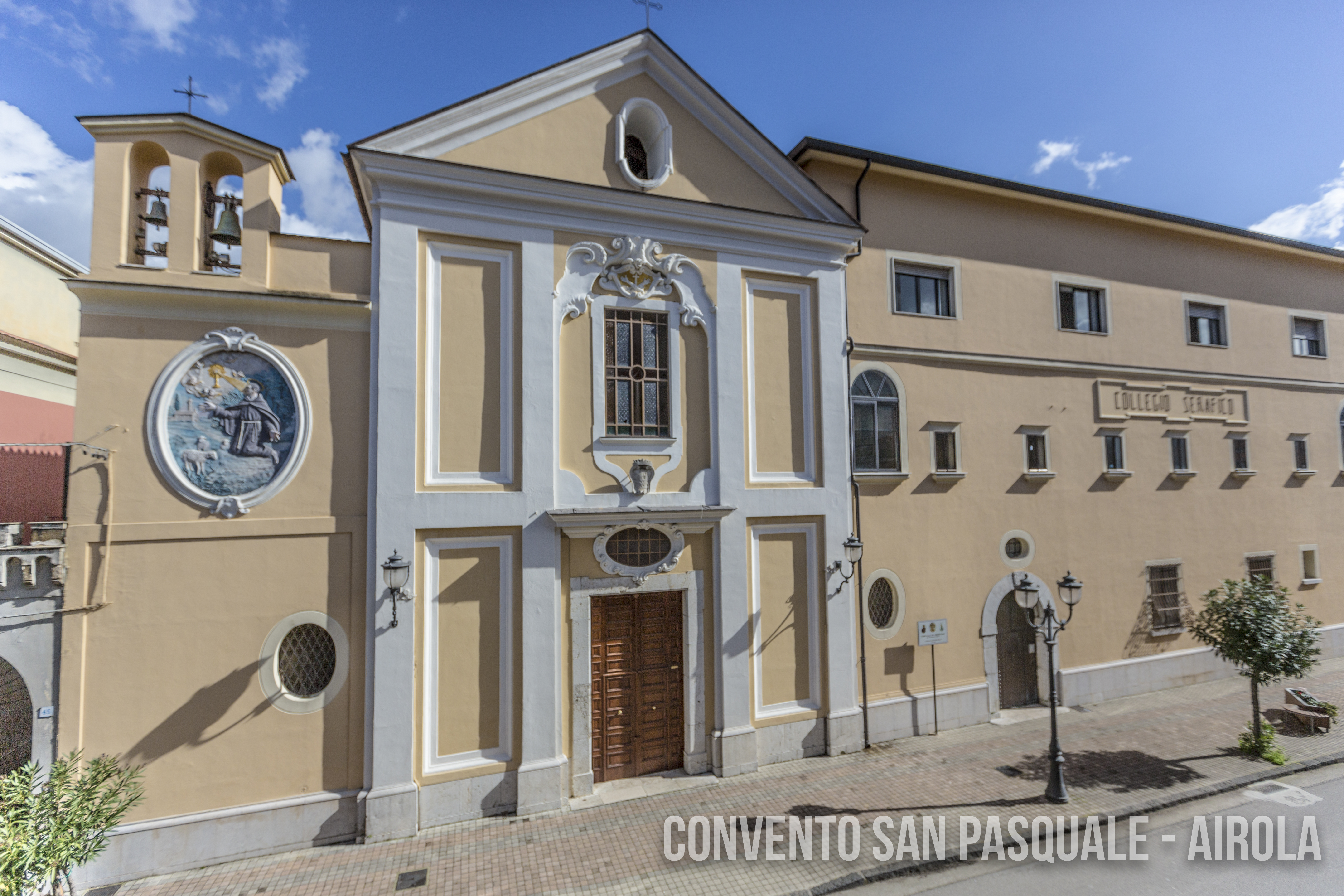 Facciata della Chiesa e Convento della SS. Concezione di Airola (BN) dei Frati Minori